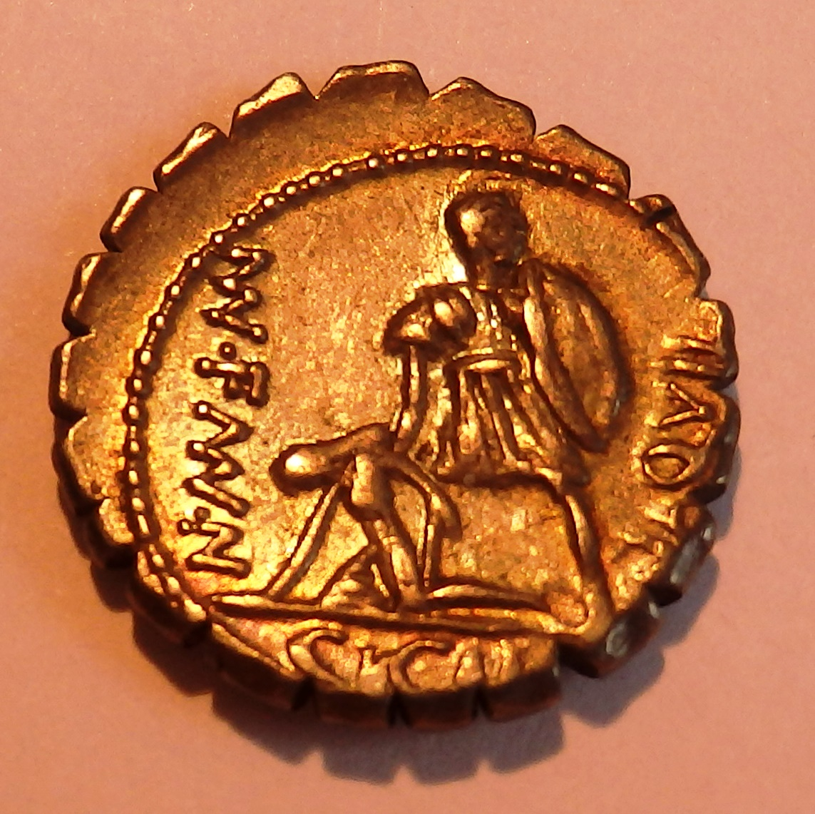 Gedenkprägung (Jahr 71 v. Chr.) auf Niederschlagung Sklavenaufstand Sizilien, Legionär hilft der personifizierten Sizilia auf, Albert 1303